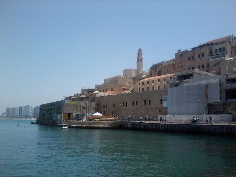 טיול ביפו העתיקה